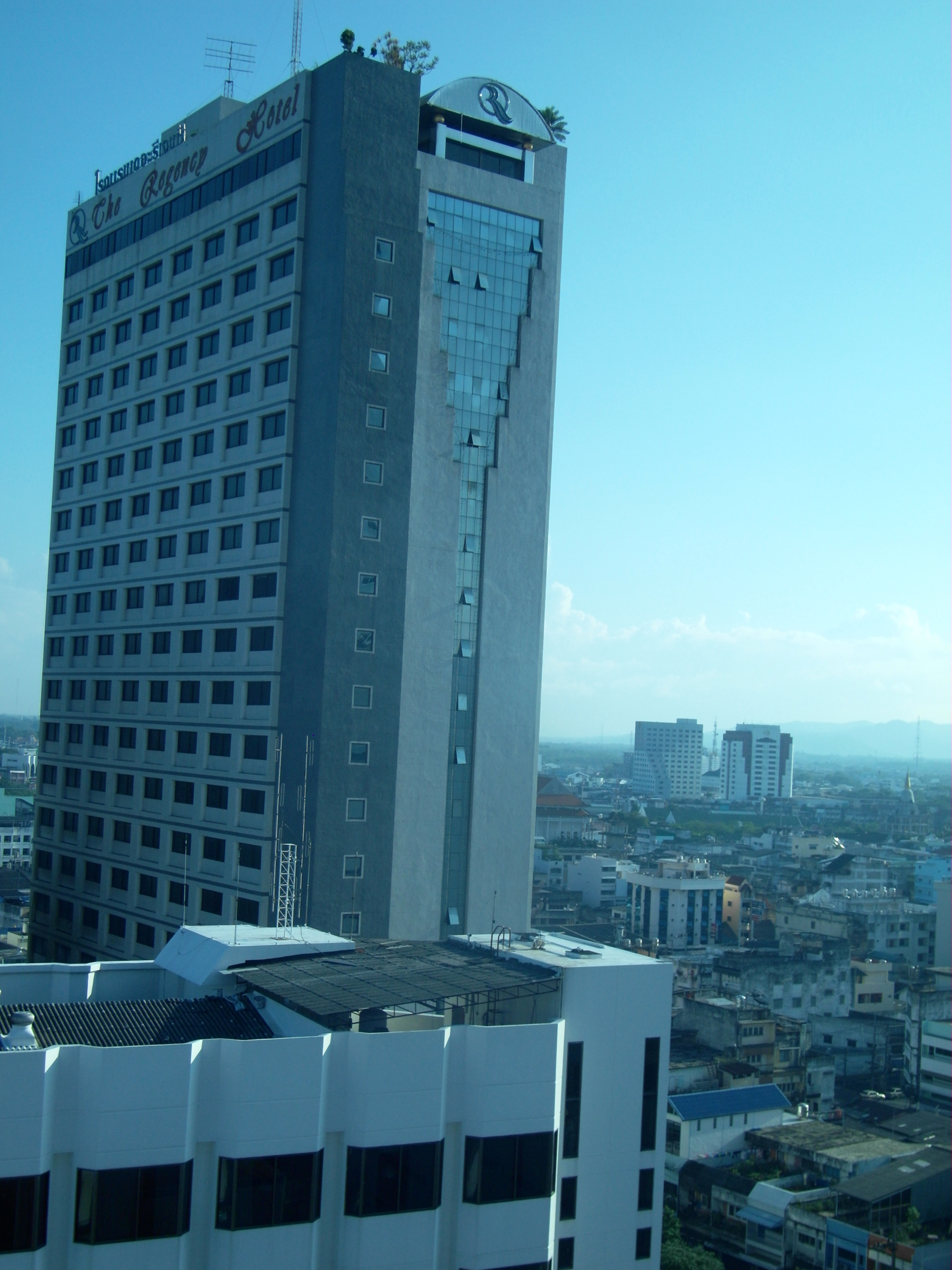 Hat Yai, Hat Yai District, Songkhla 90110, Thailand